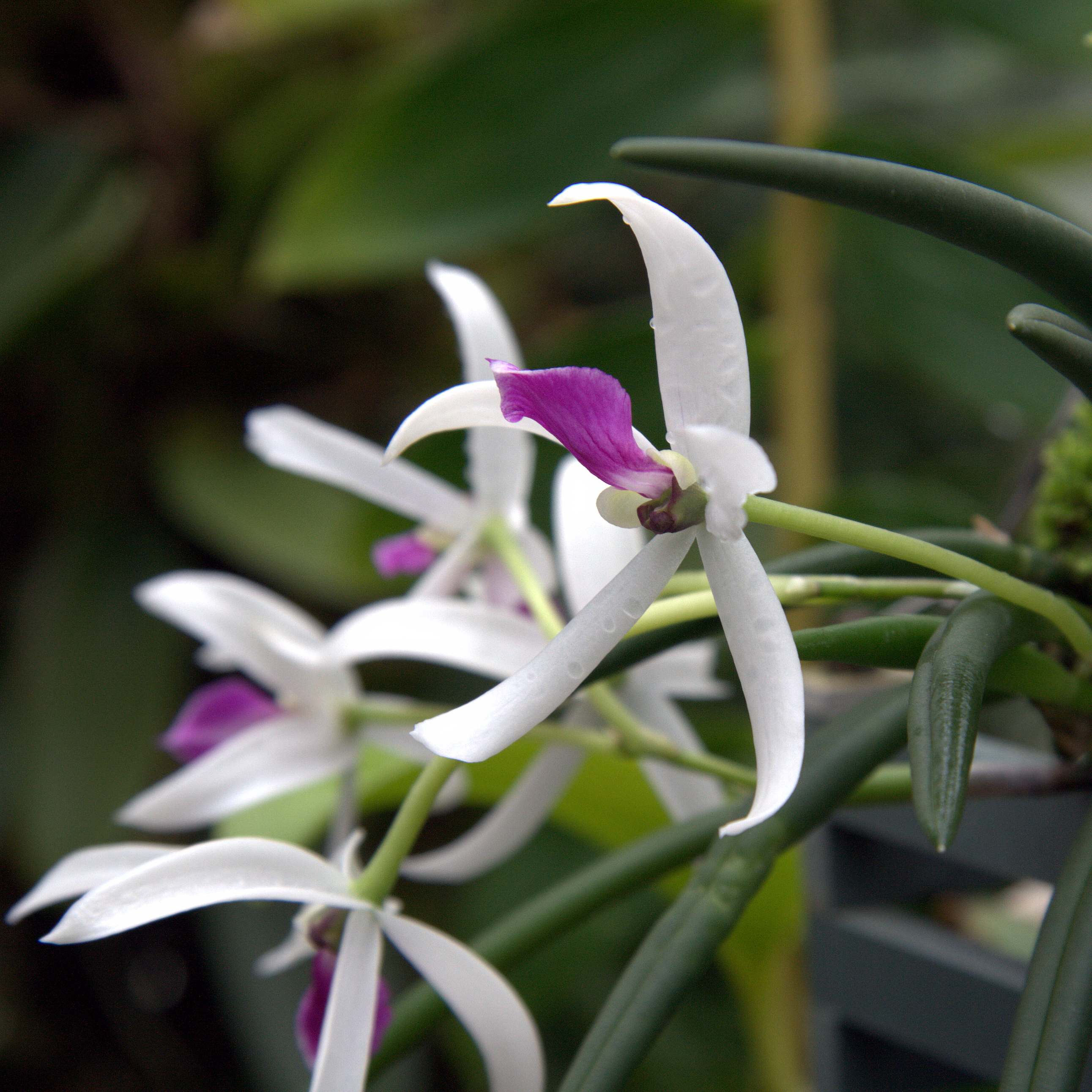 Leptotes bicolor